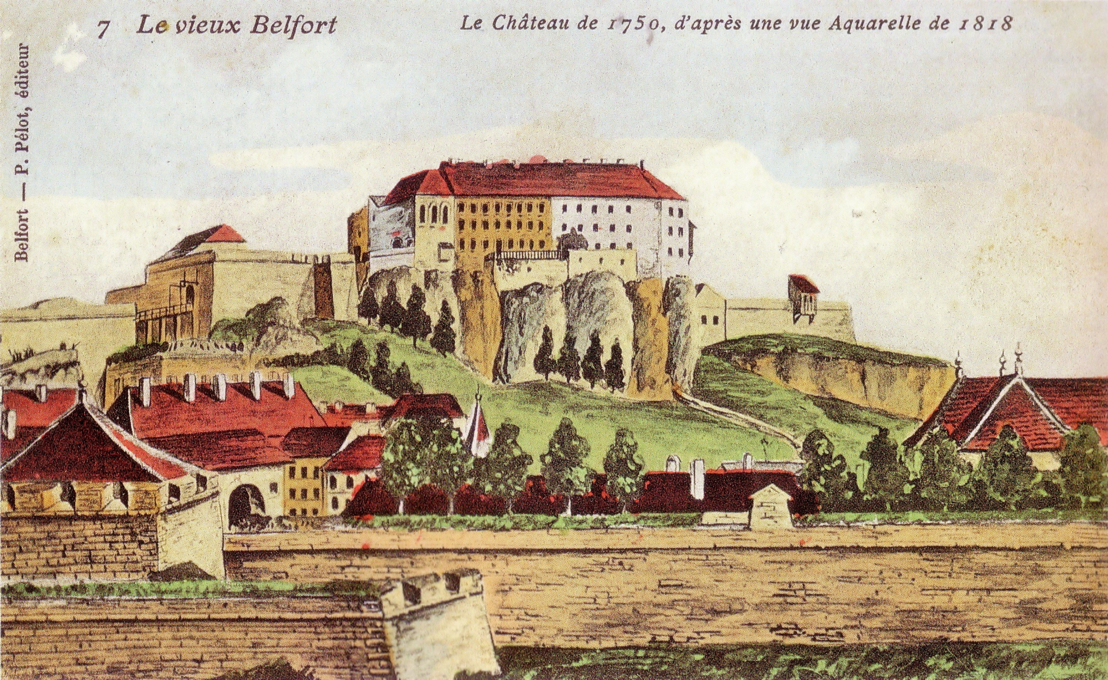 Aquarelle de 1818 représentant la citadelle de Belfort en 1750.